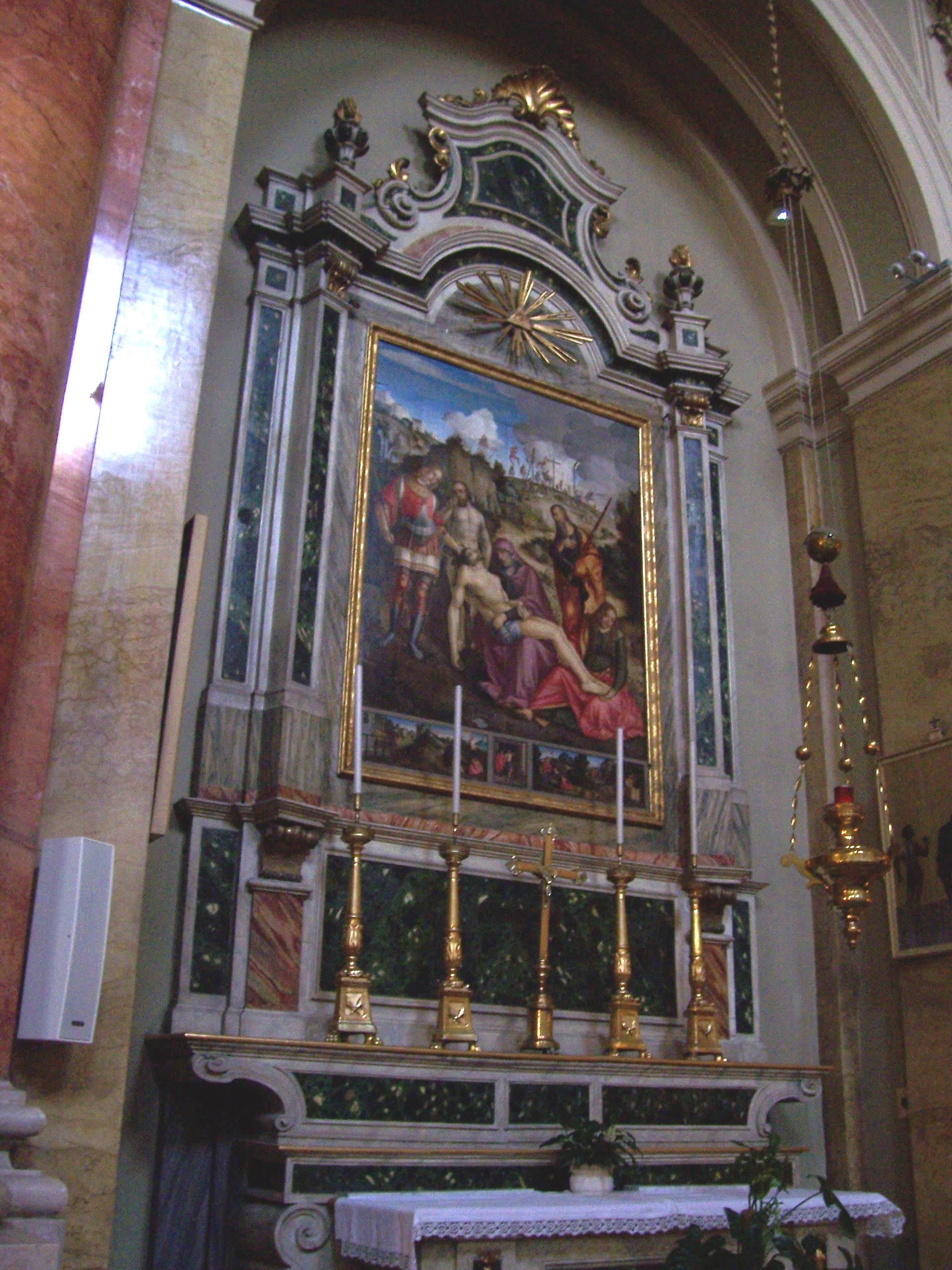 sant'alessandro (brescia) deposizione civerchio.jpg